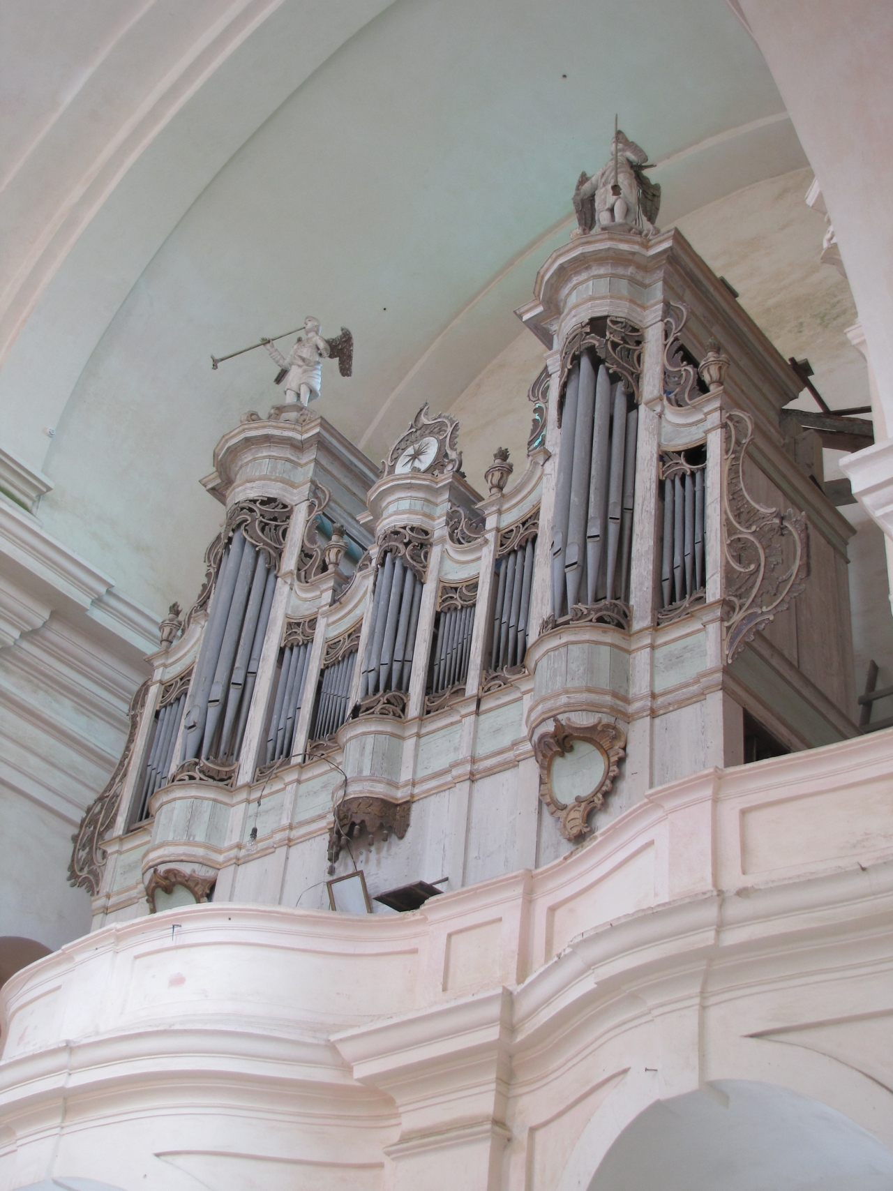 Беларуская (тарашкевіца): Комплекс былога кляштара бэрнардынцаў, дэкаратыўнае аздабленьне касьцёла: галоўны і бакавыя алтары росьпісы. в. Будслаў Former Bernardine monastery complex (Budslau, Myadel district, Belarus) This is a photo of Belarusian heritage monument. Reference number: 611Г000422 ( WLM)